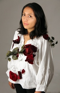 Verónica Cordova de la Rosa Artista Visual y performer artist